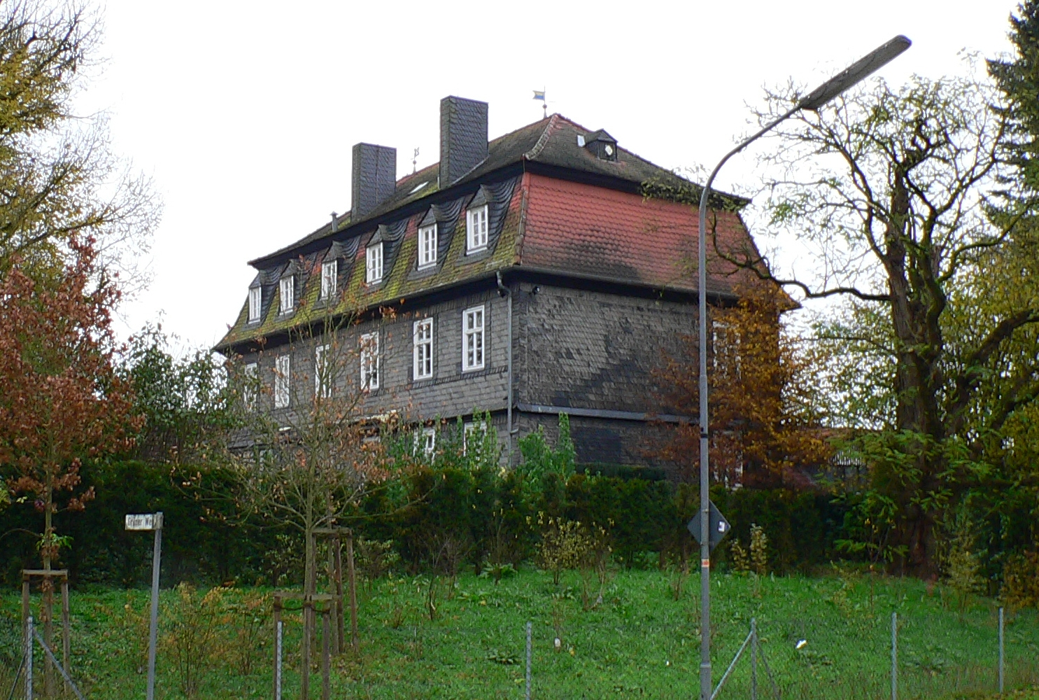 Jagdschloss Bracht in Rauschenberg-Bracht, Hessen, Deutschland